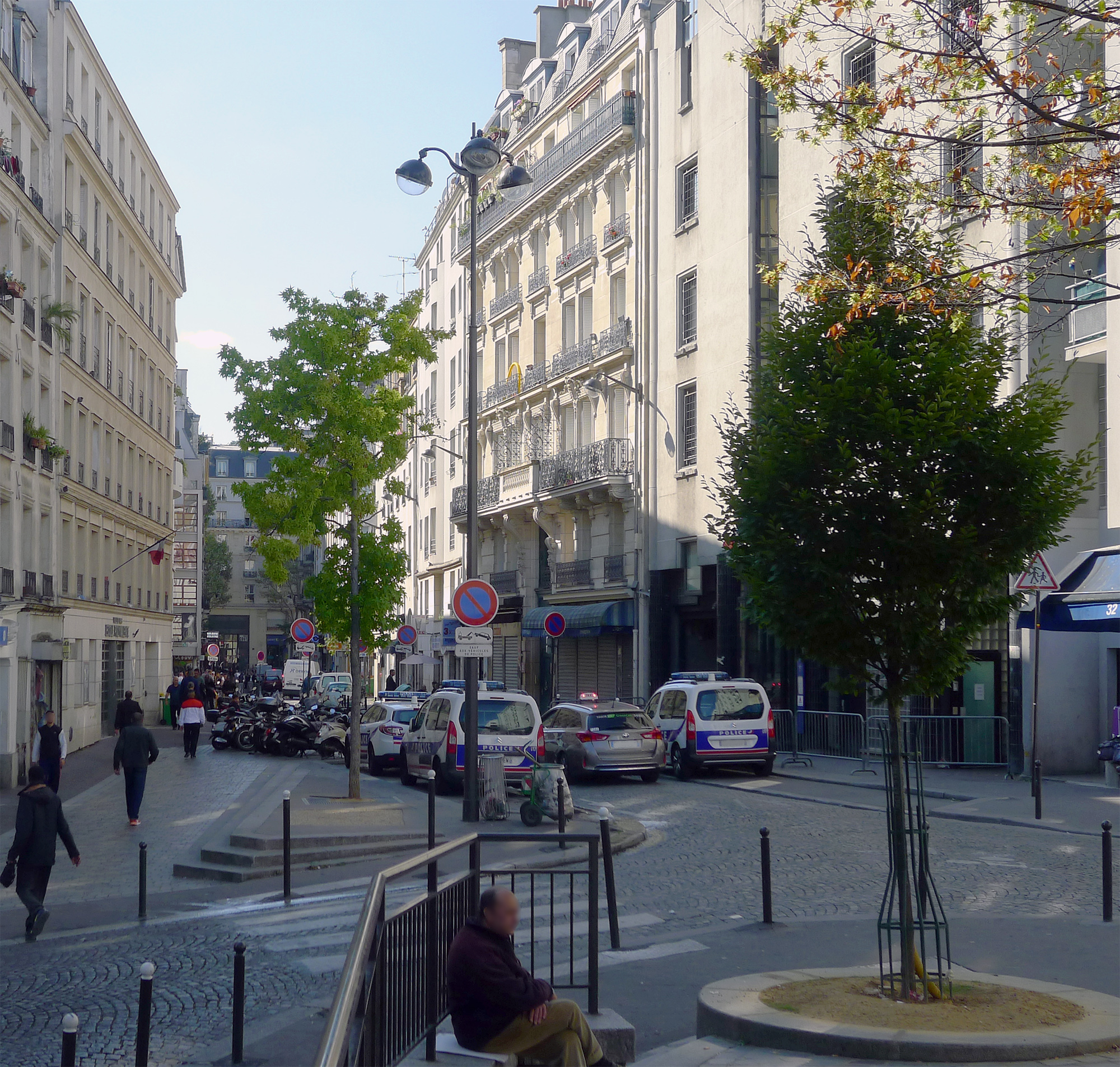 Rue de la Goutte-d'Or - Paris XVIII